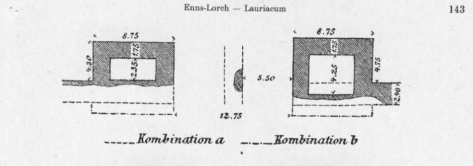 Grabungsplan der Porta principales dextra (Westtor) des LL Lauriacum von 1900